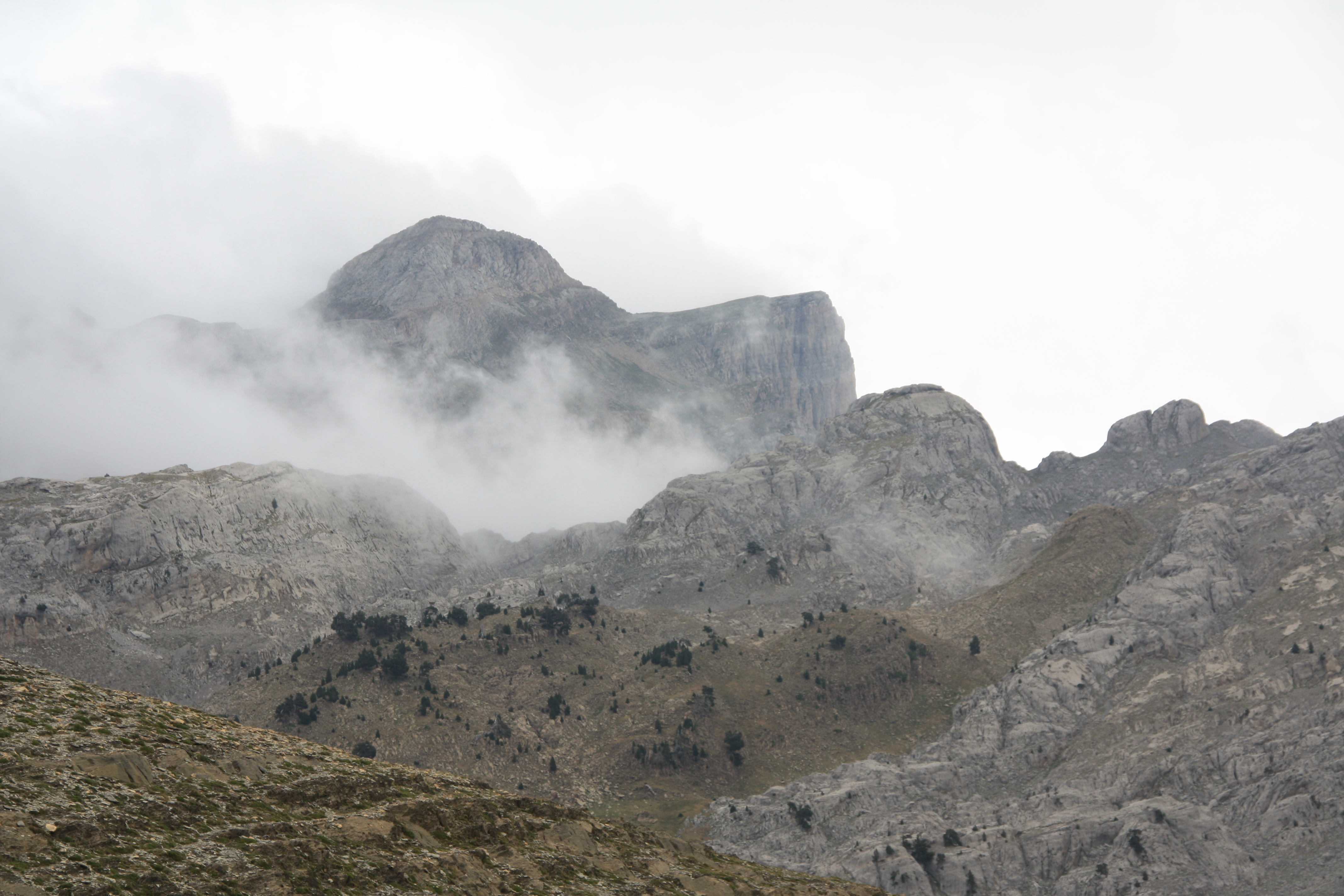 Hiru Erregeen Mahaiaren ikuspegia laino artean Linzako lepotik.